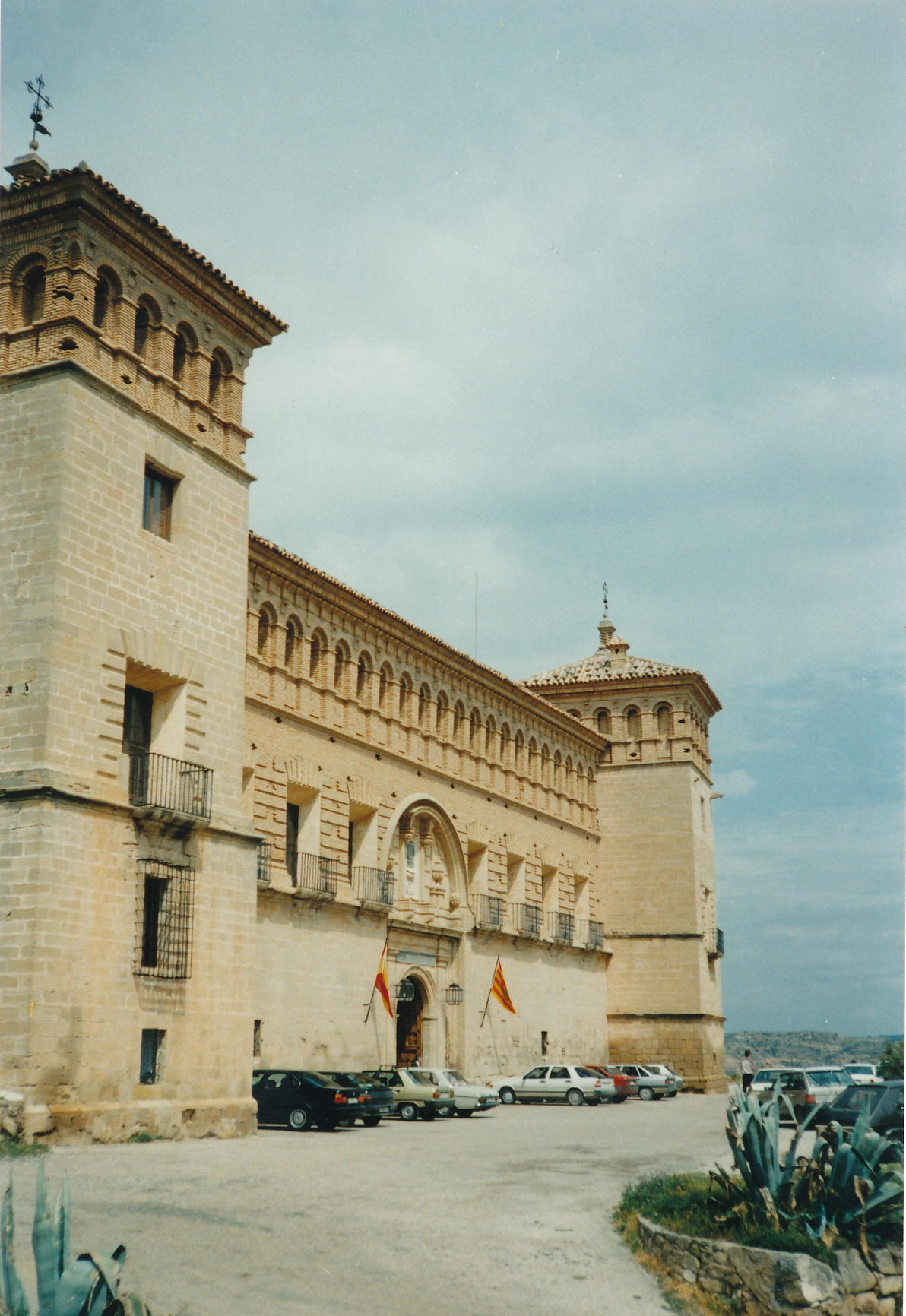 Vormalige Klosterburg des Calatrava-Ritterordens, heute Parador National, in Alcañiz.jpg Datum: 06/1989 Urheber: Michael Pfeiffer Quelle: privates Fotoalbum des Urhebers